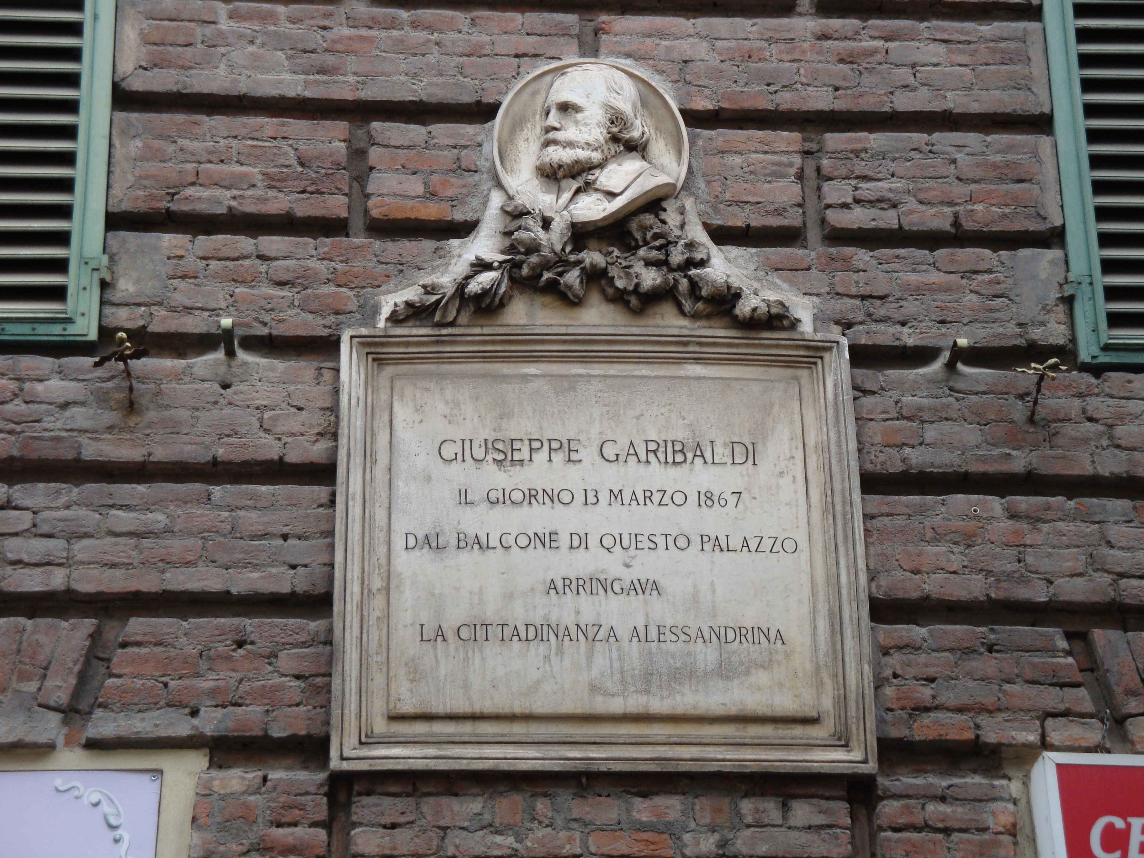 Fotografia di Tony Frisina